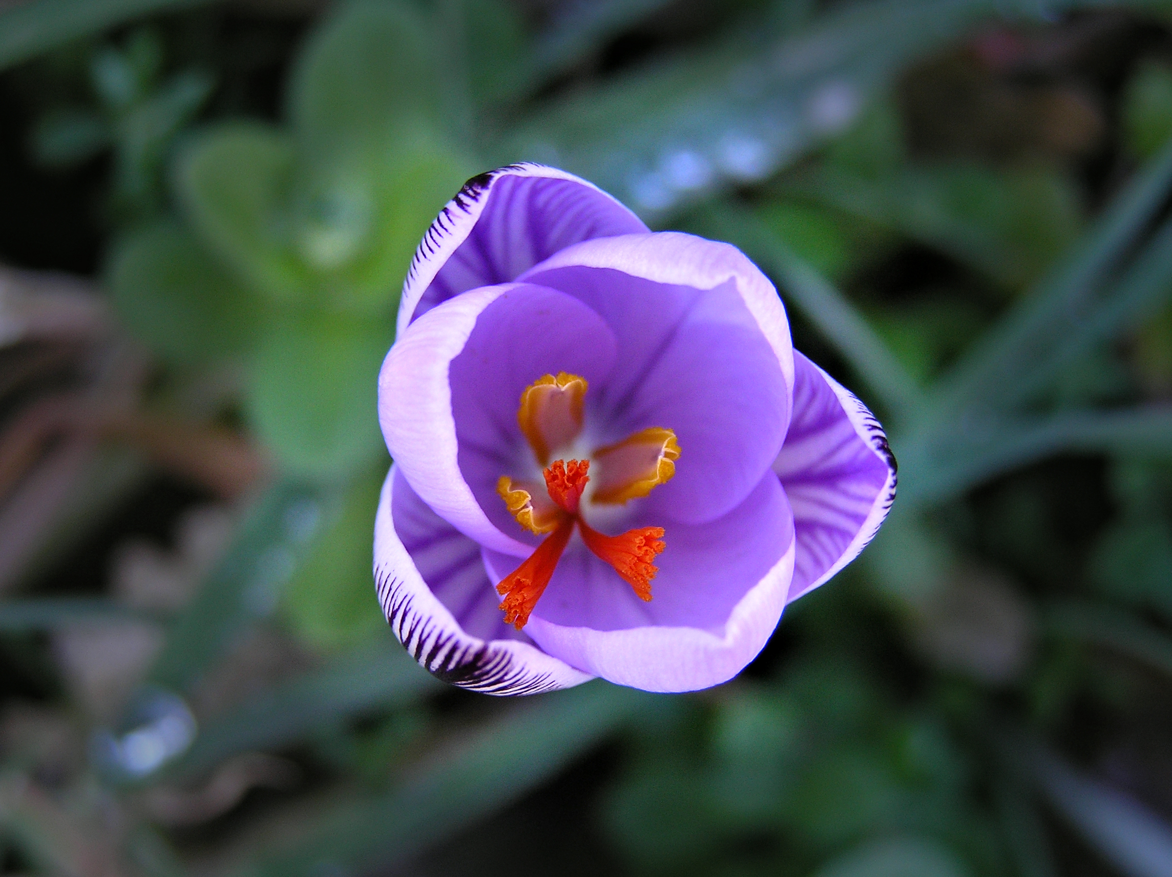 Lavatoggio (Corse) - Crocus corsicus Février 2006